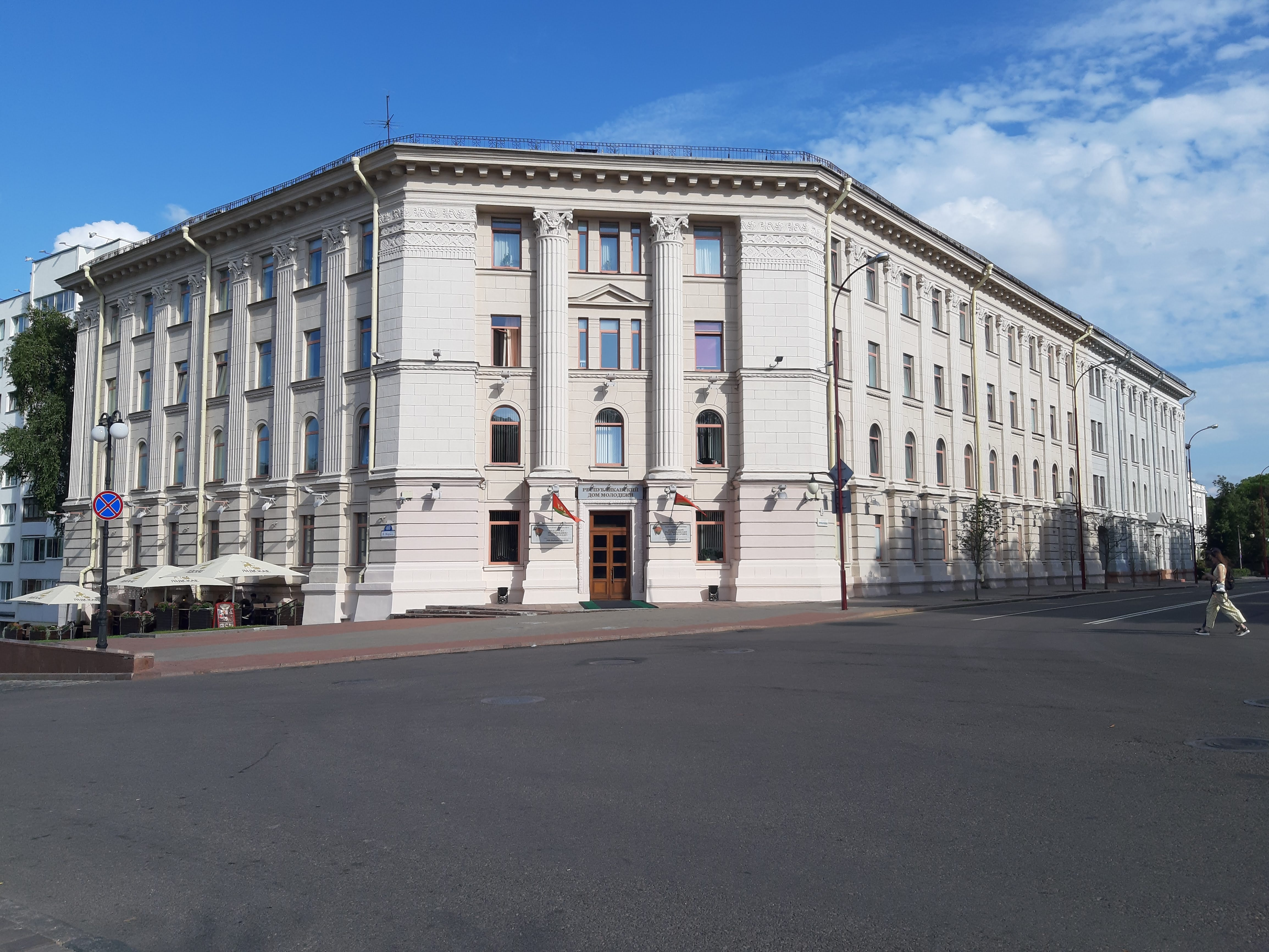 Мінск. Па Чырвонаармейскай